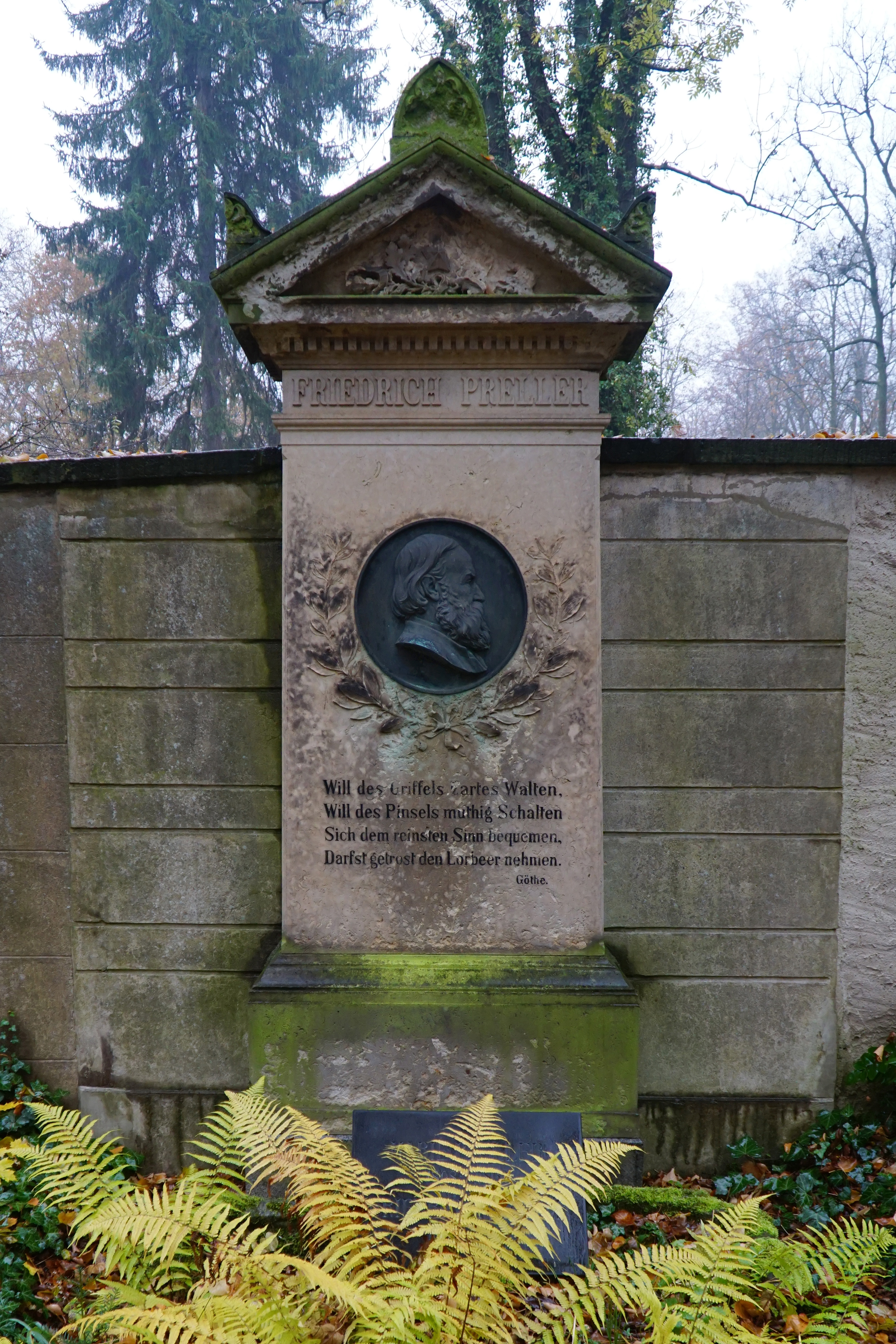 Inschrift: Will des Griffels zartes Walten, Will des Pinsels muthig Schalten Sich dem reinsten Sinn bequemen, Darfst getrost den Lorbeer nehmen. Göthe.